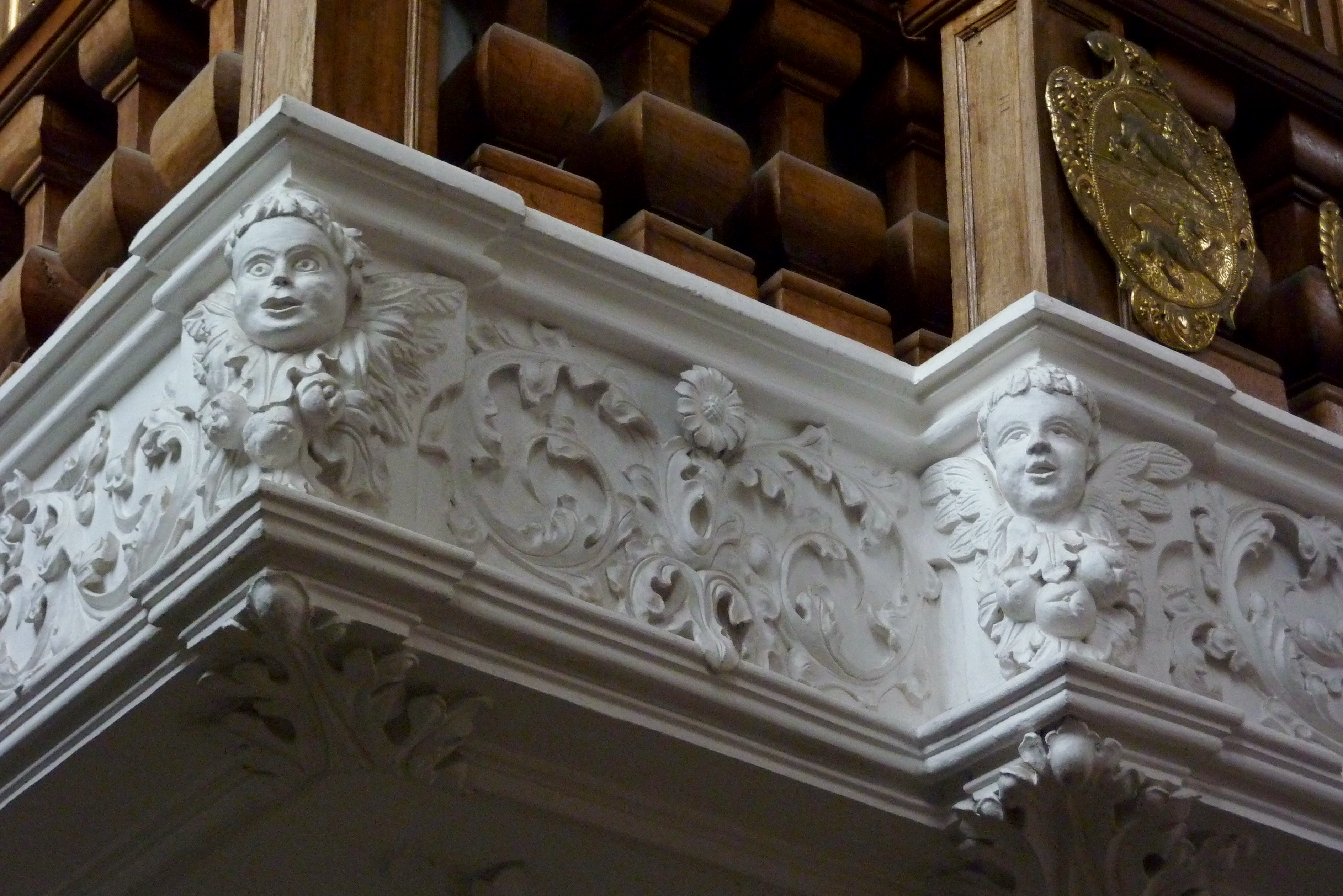 Ehemalige Damenstiftskirche, katholische Pfarrkirche St. Johannes Baptist und Johannes Evangelist in Edelstetten in der Gemeinde Neuburg an der Kammel im Landkreis Günzburg (Bayern), Orgelempore, ehemaliger Chor der Stiftsdamen, Stuck am Sockel der Emporenbrüstung, von 1710/11 von Simpert Kraemer